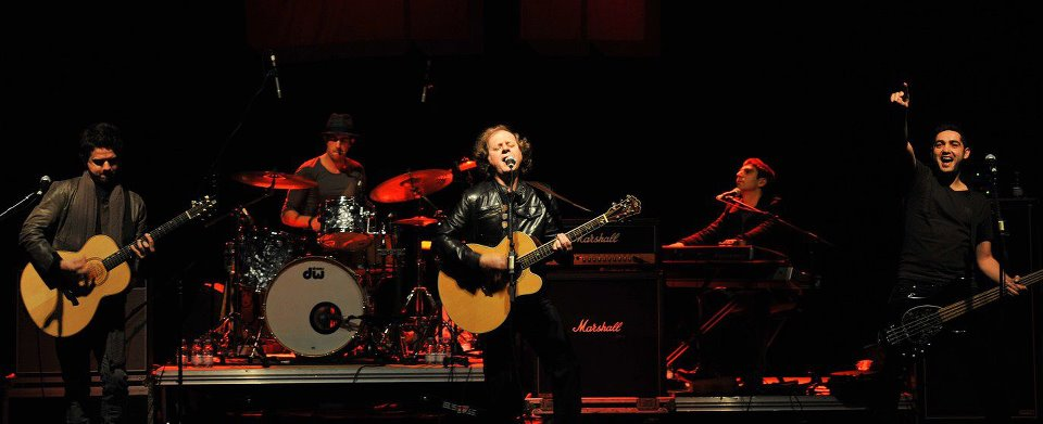 Penafiel